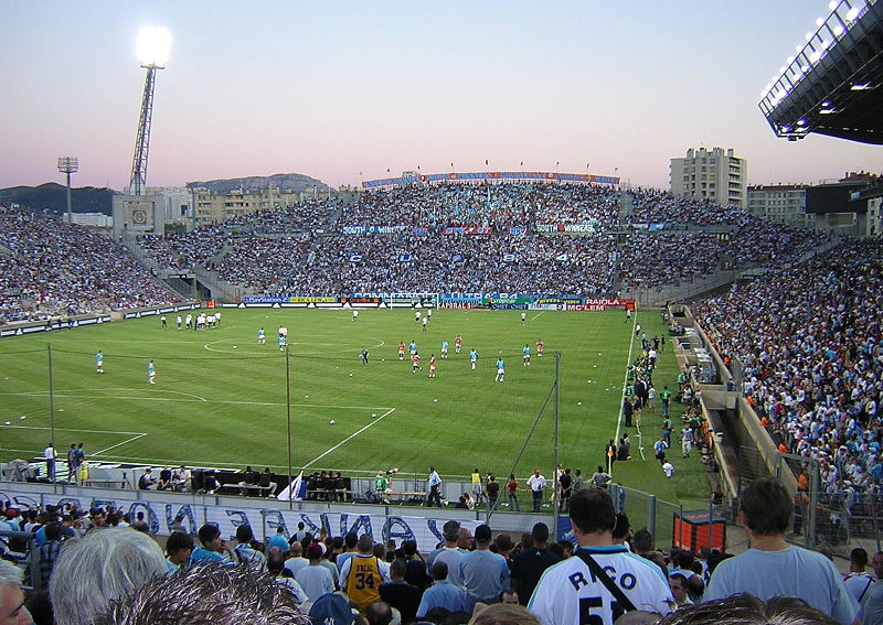 Avant-match OM-LOSC, vu du Virage Nord.